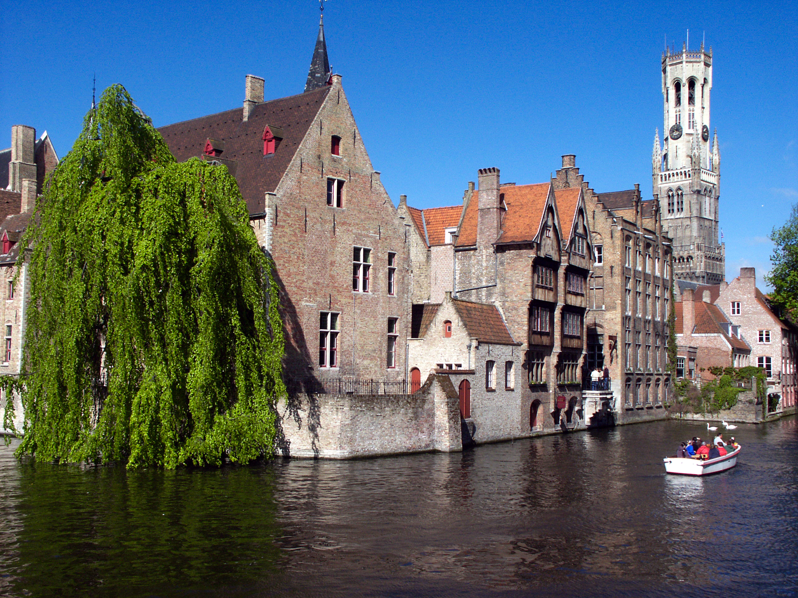 Vue du canal à Rozenhoedkaai